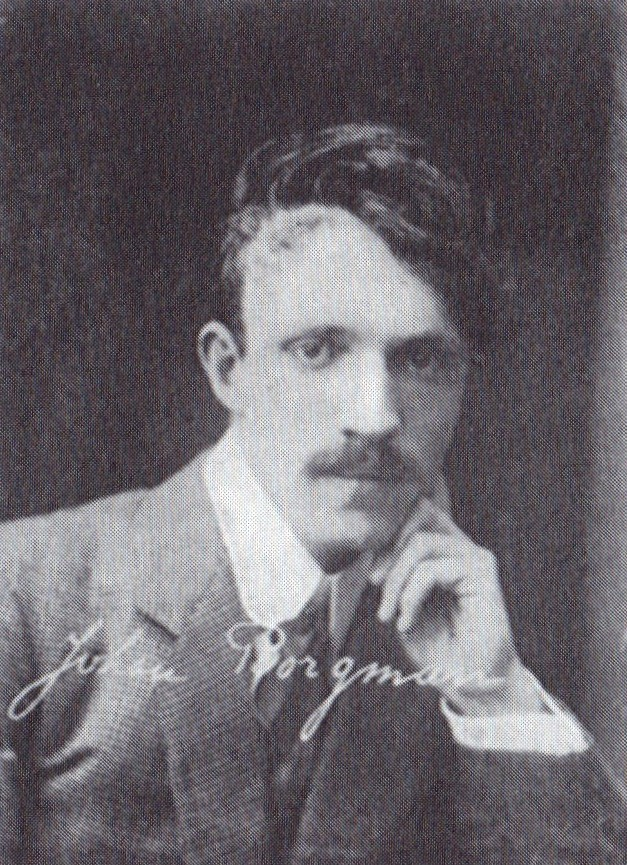 Johan Borgman ca. 1915